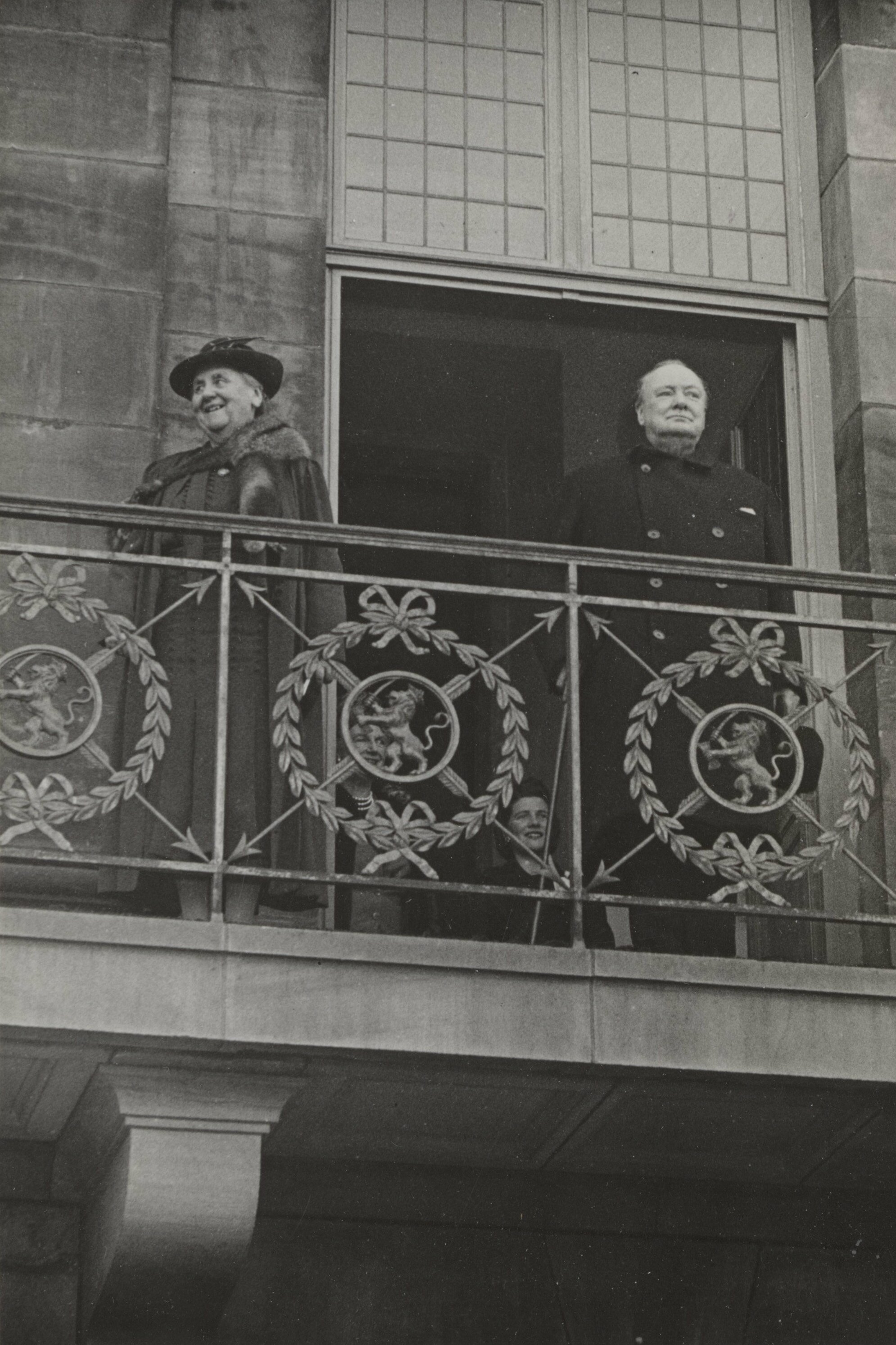 Collectie / Archief : Fotocollectie Elsevier Reportage / Serie : [ onbekend ] Beschrijving : Ontvangst van Winston Churchill op het Paleis op de Dam. Een juichende menigte begroette de staatsman toen hij naast koningin Wilhelmina op het bordes verscheen Datum : 8 mei 1946 Locatie : Amsterdam, Noord-Holland Trefwoorden : balkons, koninginnen, koninklijk huis, staatslieden Persoonsnaam : Churchill, Winston, Wilhelmina, koningin Fotograaf : Raucamp, Koos / Anefo Auteursrechthebbende : Nationaal Archief Materiaalsoort : Foto (zwart/wit) Nummer archiefinventaris : bekijk toegang 2.24.05.02 Bestanddeelnummer : 014-0724